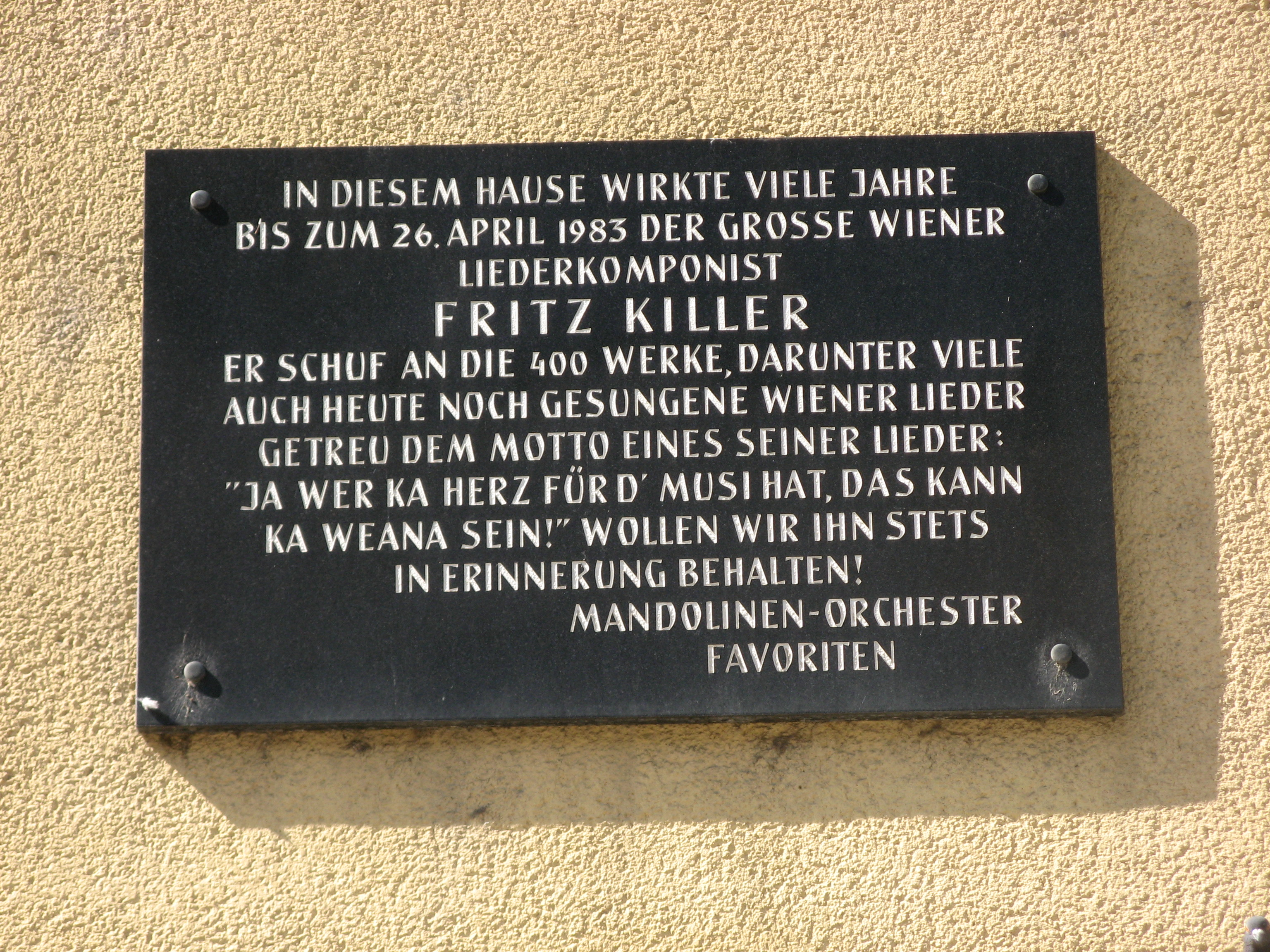 Gedenktafel für den Wienerlied-Komponisten Fritz Killer, Favoritenstraße 106, Wien-Favoriten